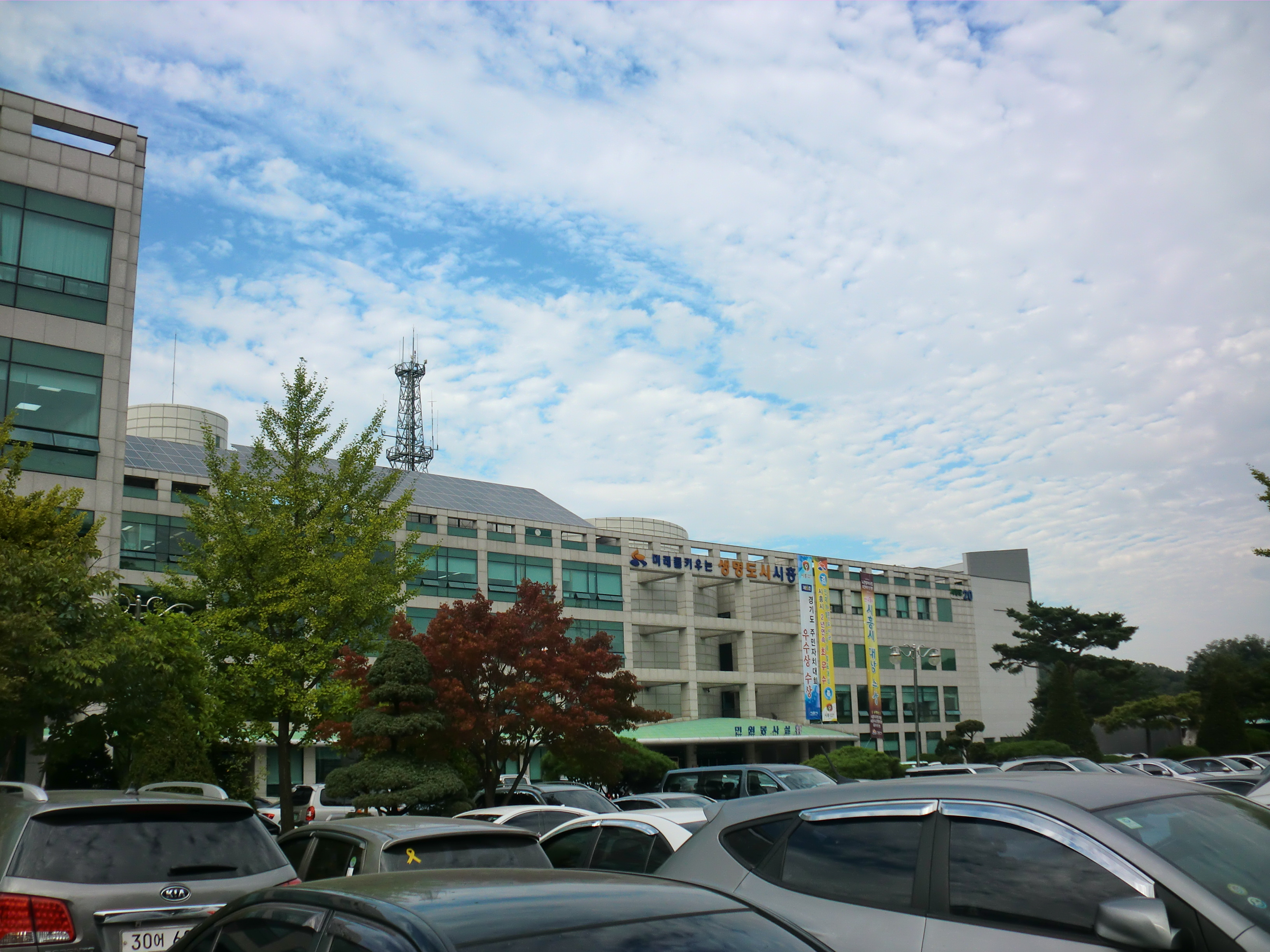 경기도 시흥시에 있는 시흥시청